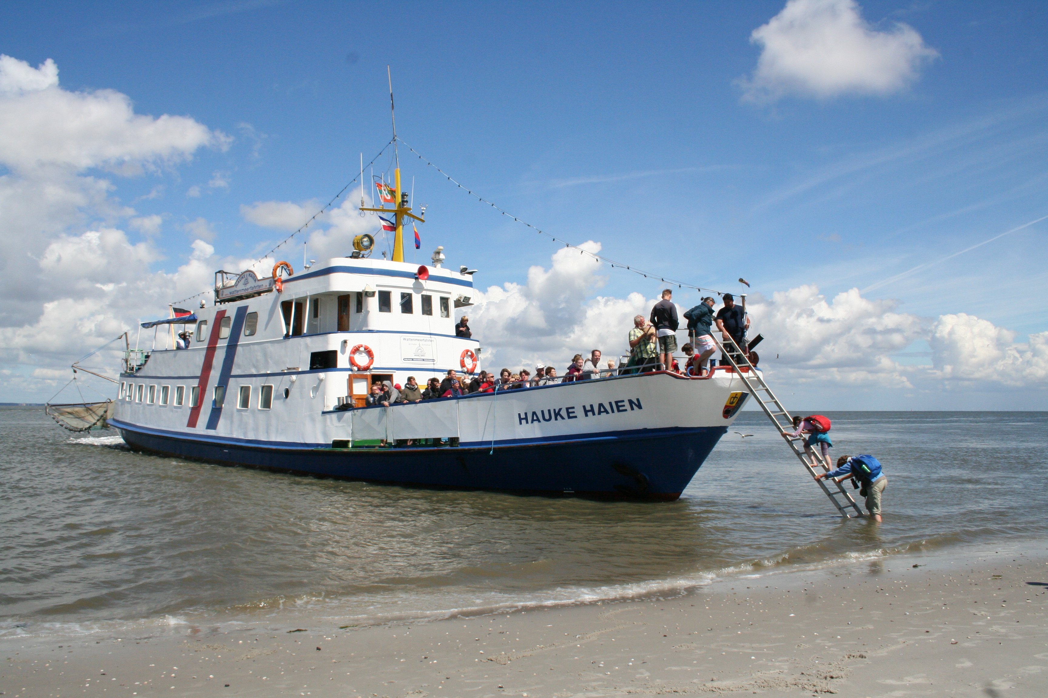 MS Hauke Haien entlässt Passagiere am Japsand, Außensand im Nationalpark Schleswig-Holsteinisches Wattenmeer